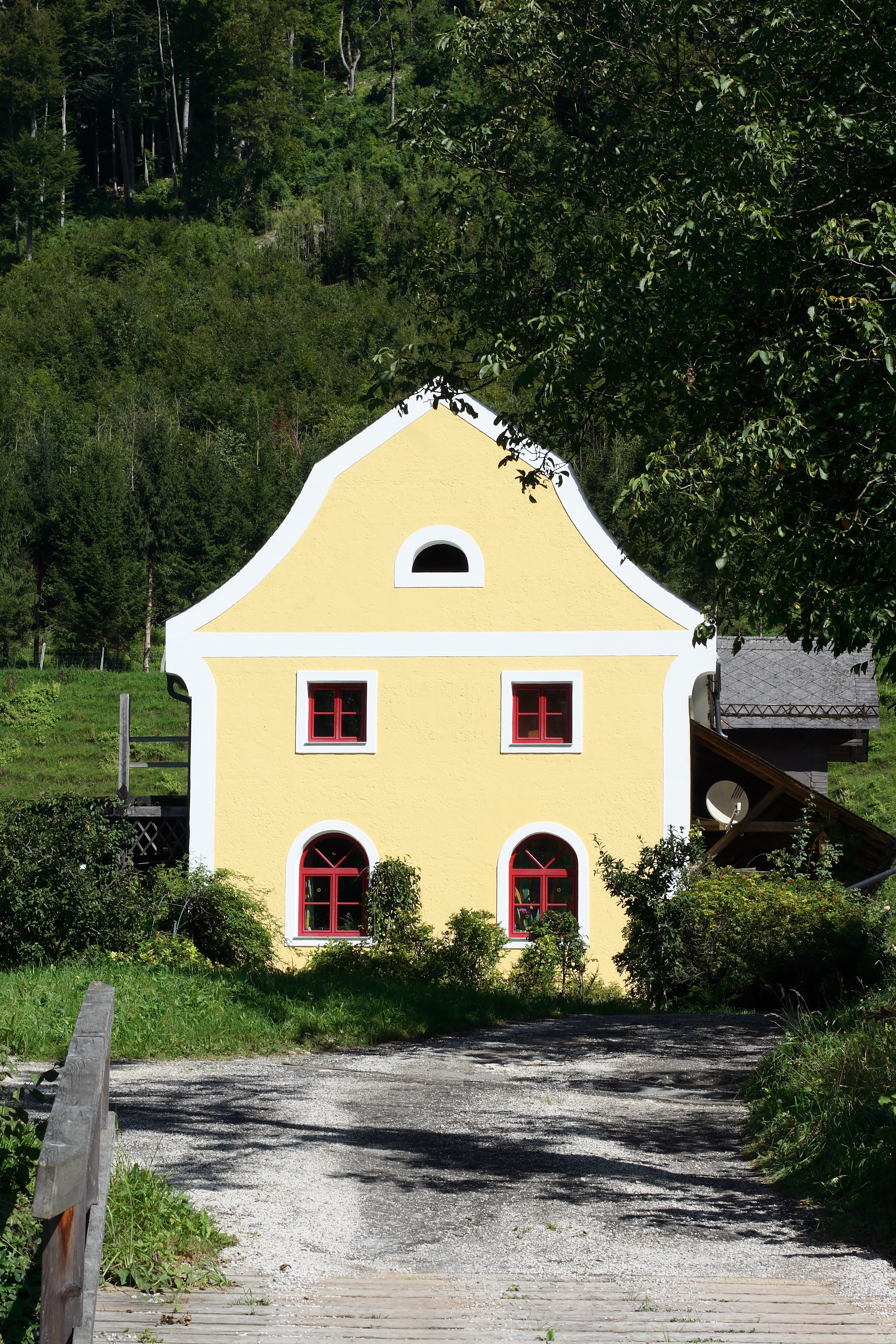 Das Magazingebäude im Freilichtmuseum Schmiedleithen (Grünburg, Oberösterreich)